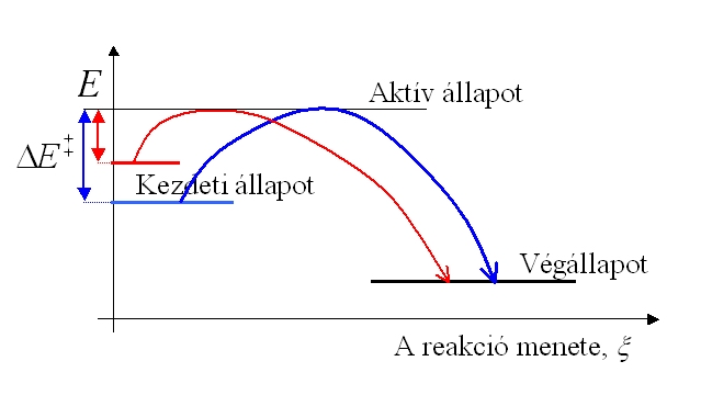 A molekulák aktív állapotának szemléltetése